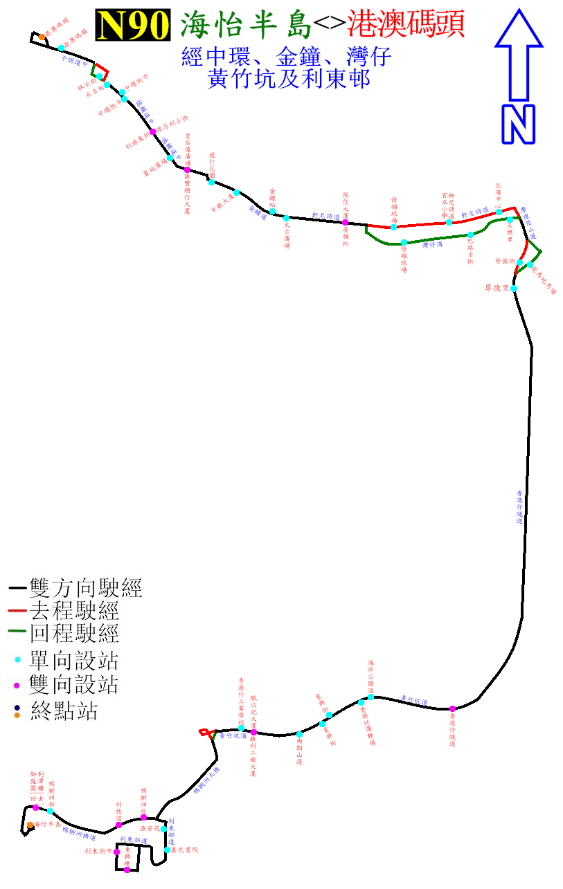 中文（香港）: 城巴N90線的走線圖